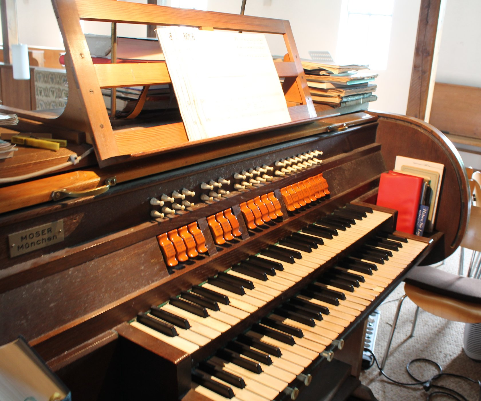 Spieltisch der Orgel der Gustav-Adolf-Kirche in München (1936, Albert Moser)